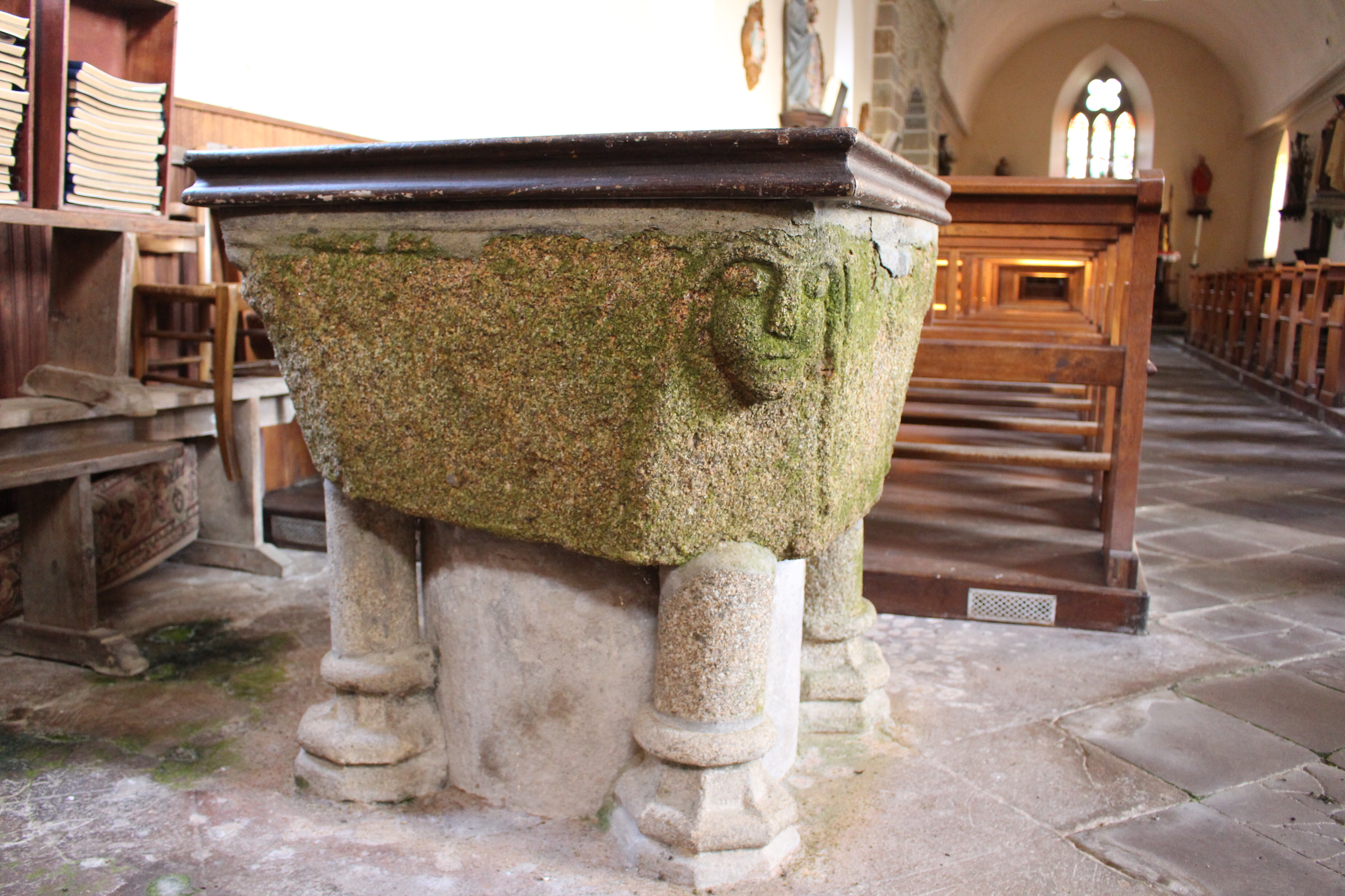 Tanis, Manche